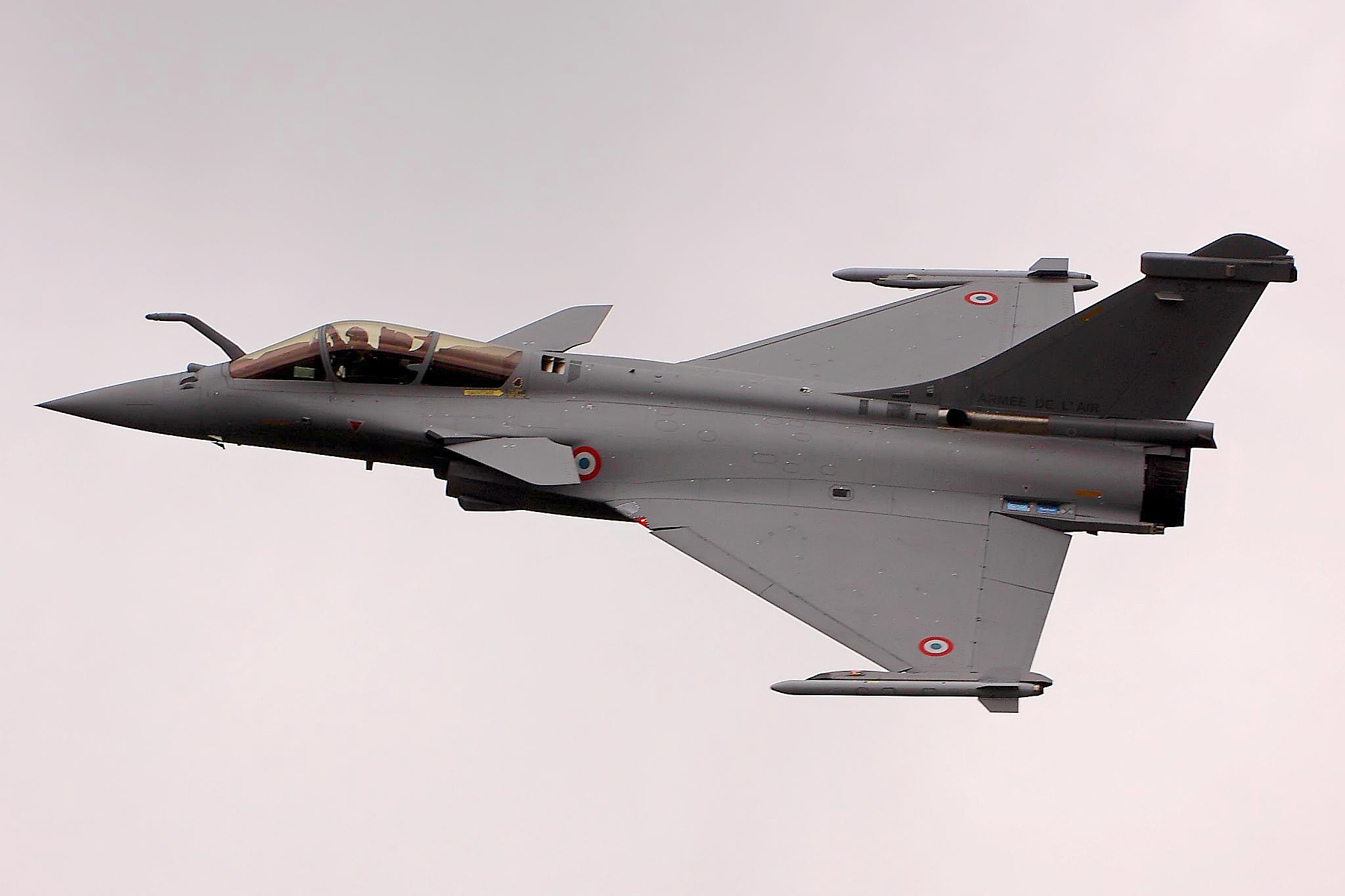 Rafale - RIAT 2012